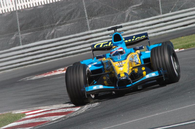 Alonso 2004 Canadian GP